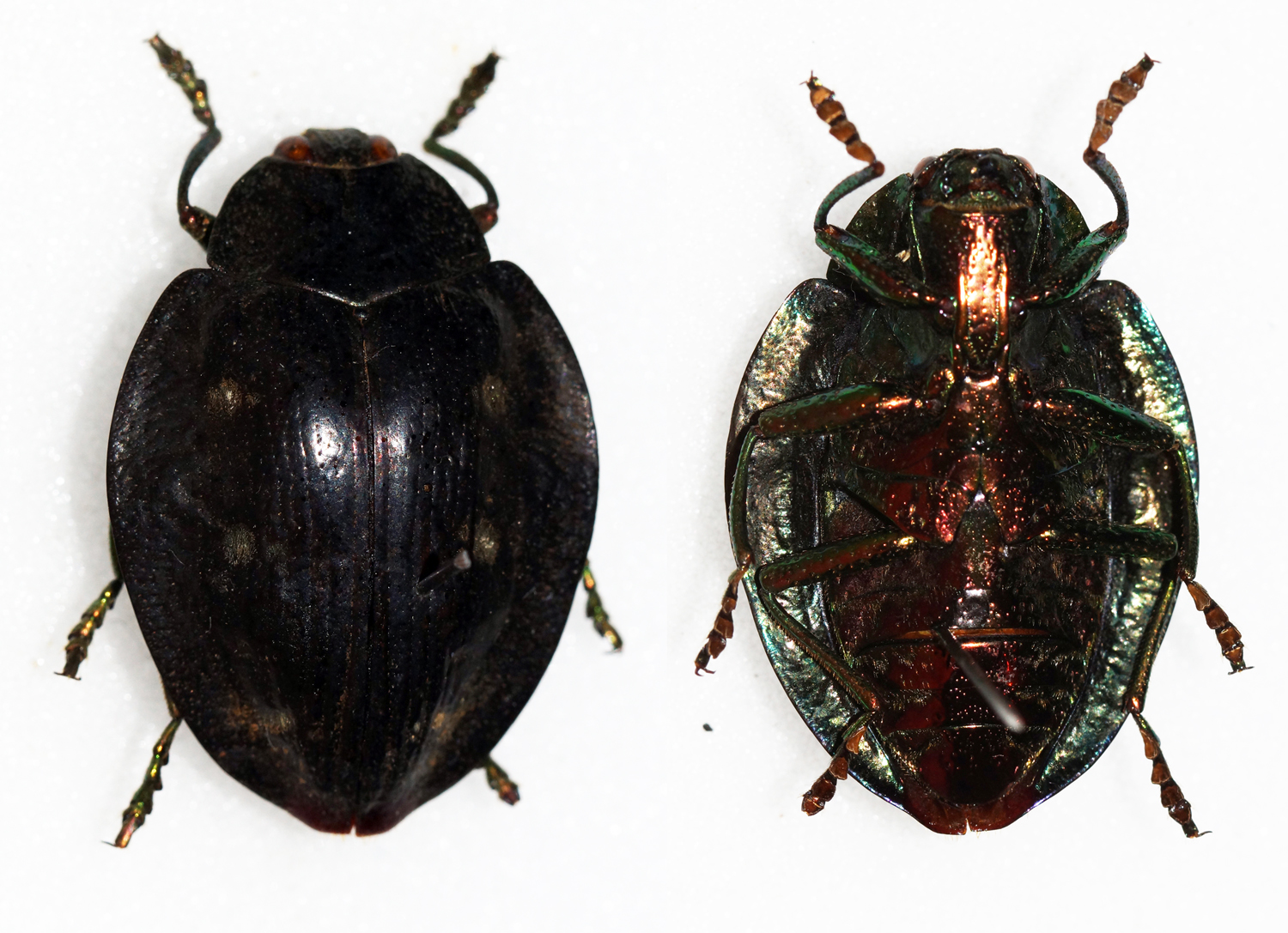 Buprestidae - In collection